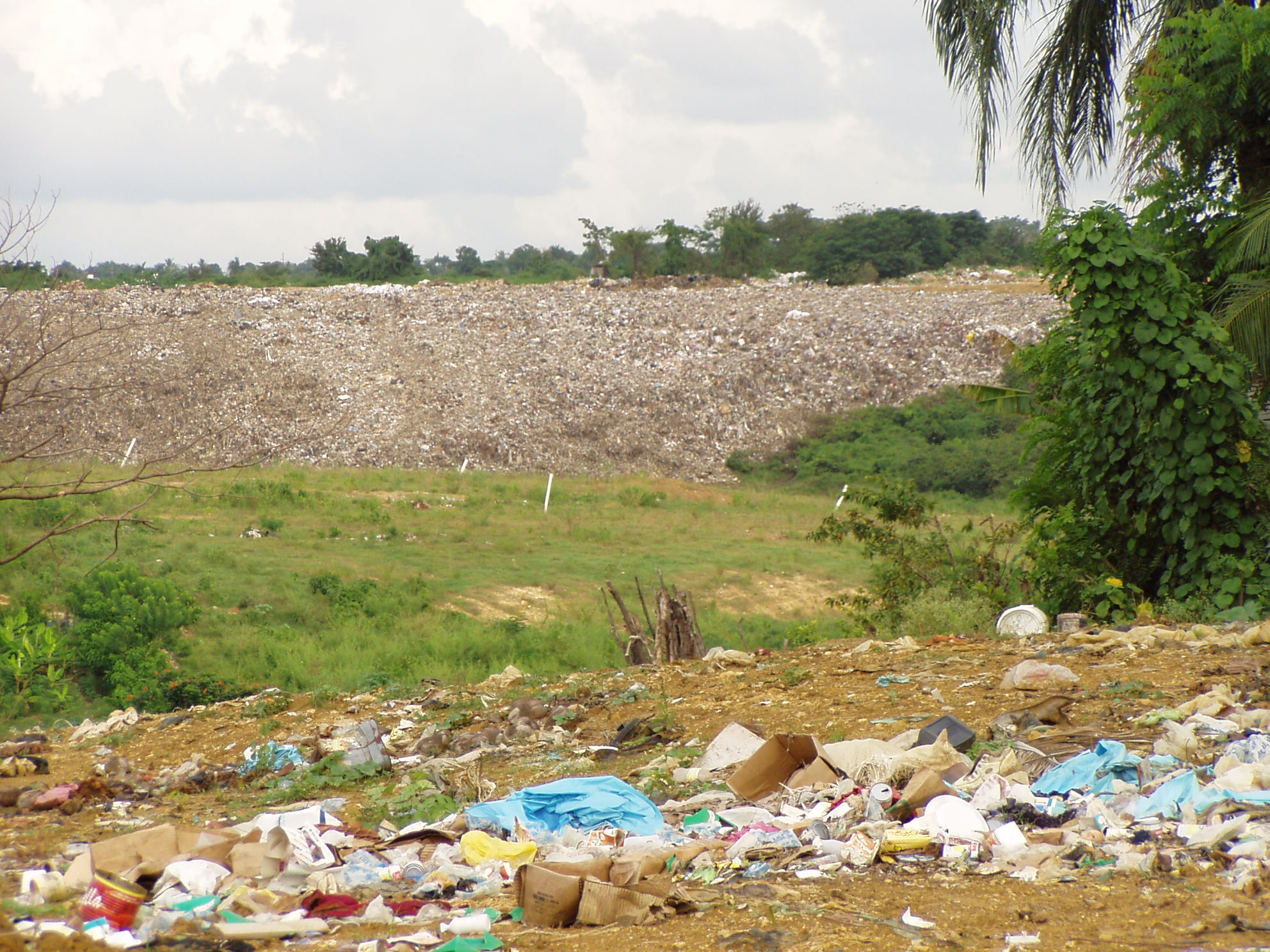 Missione genovese del Guaricano - Santo Domingo de Guzman (Dominican Republic), discarica di rifiuti di Duquesa - Foto di Donpaolo